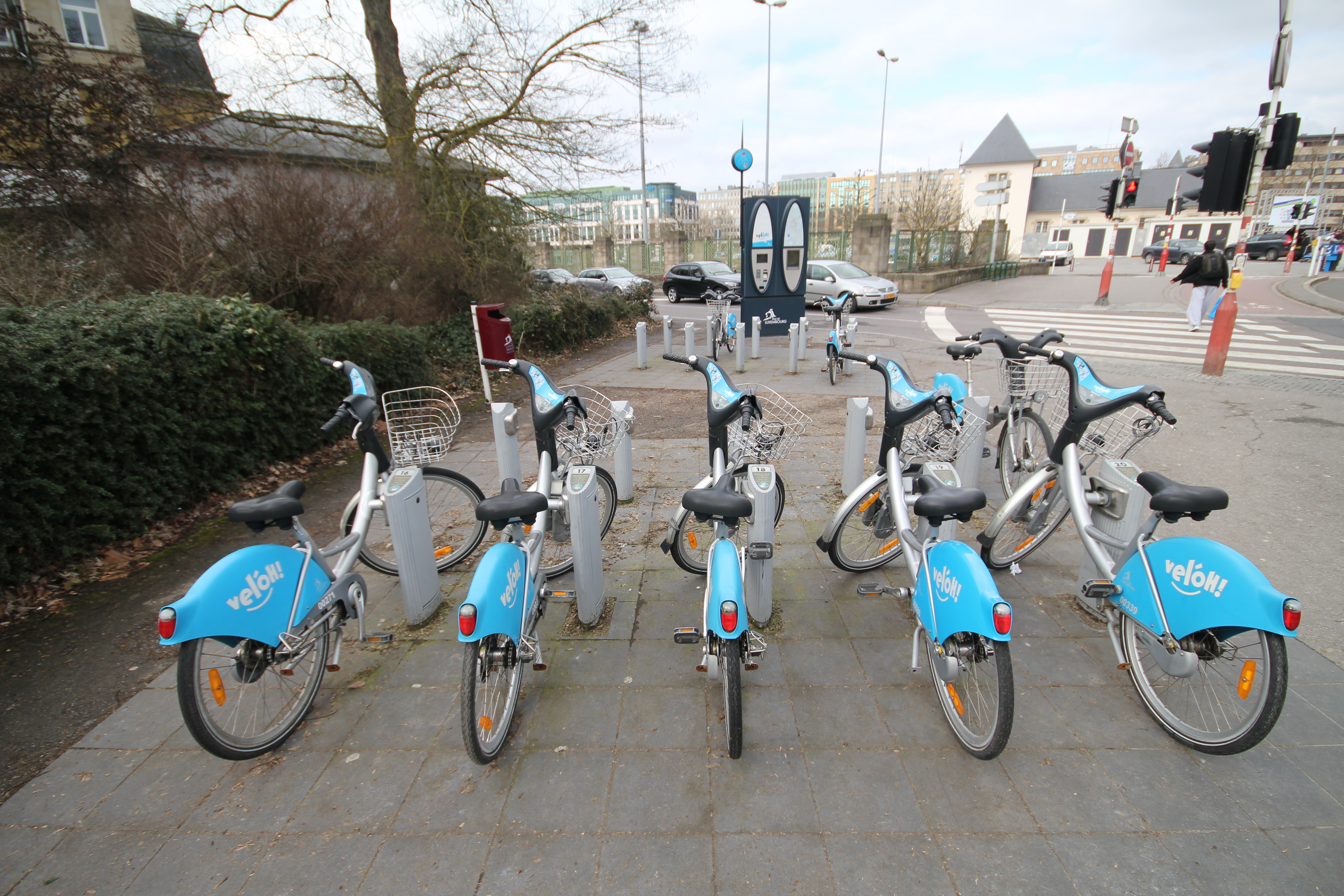 Uewerstad, Lëtzebuerg, Luxembourg